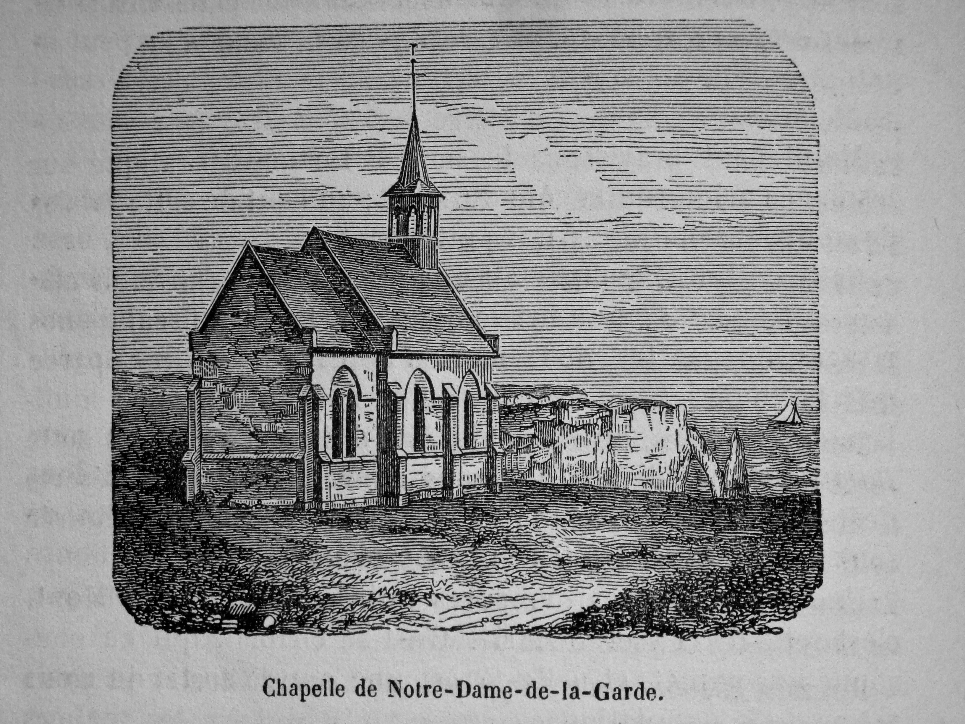 La chapelle Notre Dame de la Garde en 1869 in L'abbé Cochet, Etretat, son histoire, 1869...